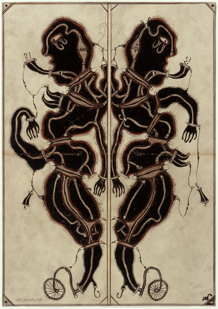 Zeichnung 1998